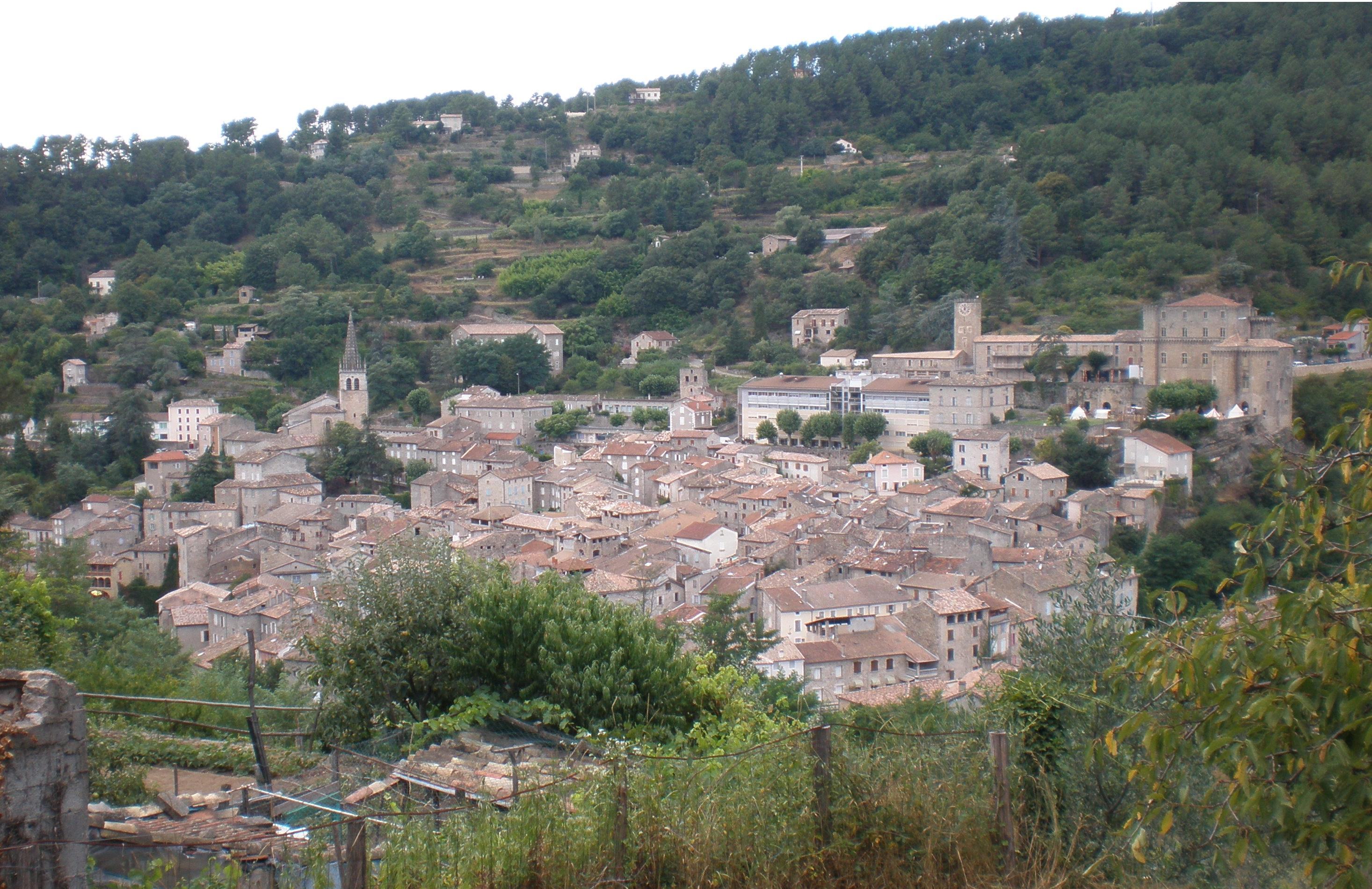 Vue sur la ville de Largentière (Ardèche)